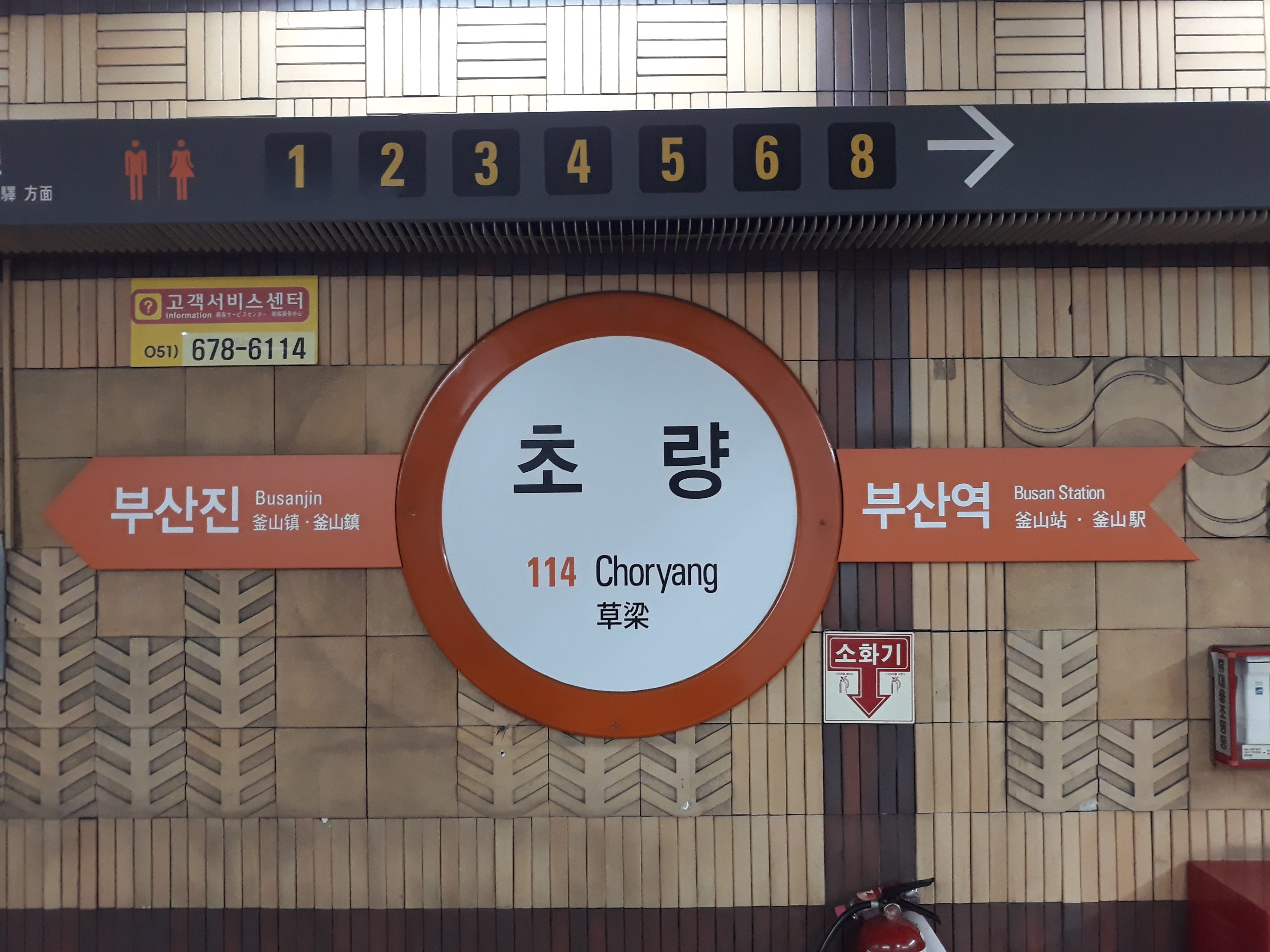 부산 도시철도 1호선 초량역 노포 방면 역명판